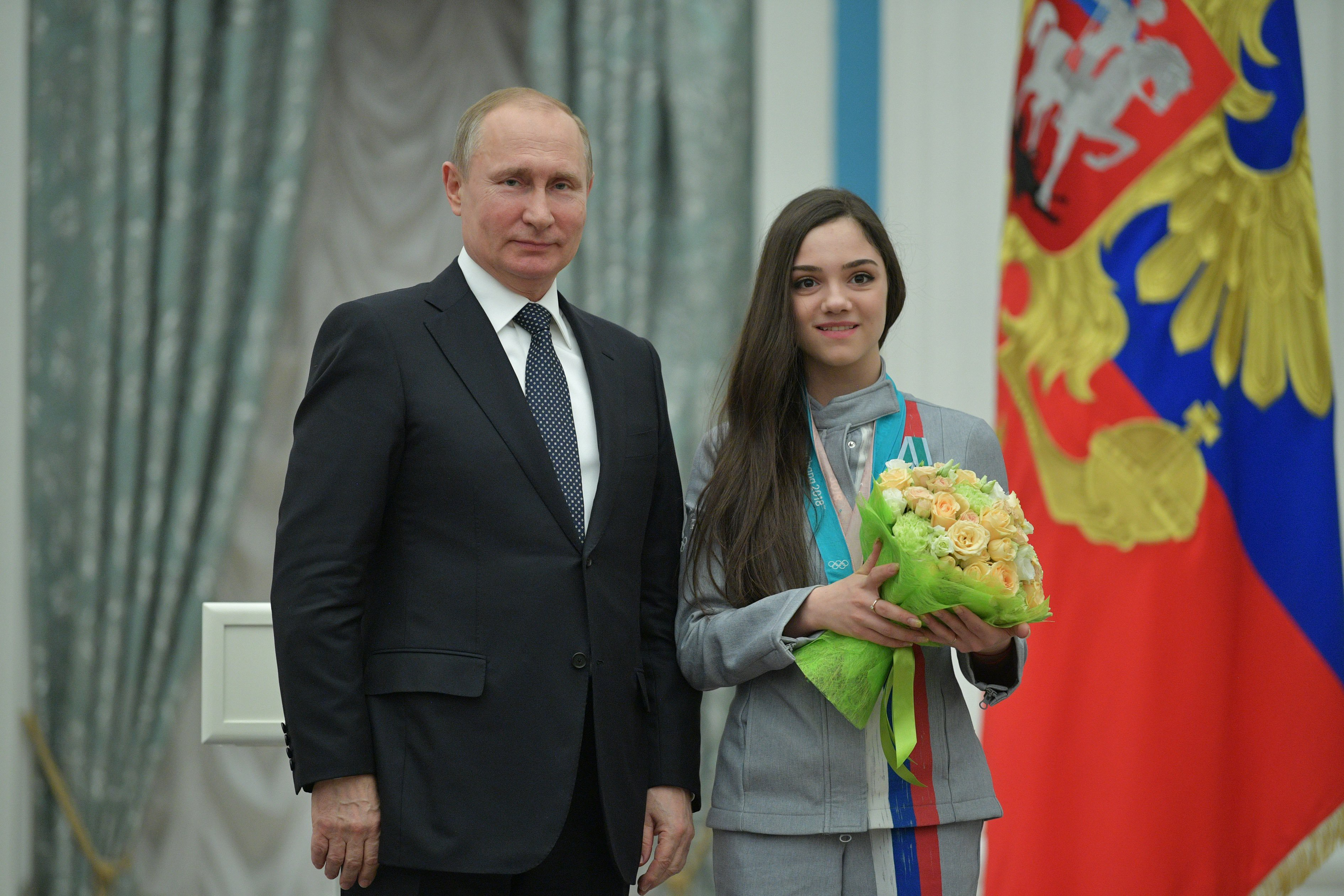 Президент России Владимир Путин с серебряным призёром Игр по фигурному катанию на коньках Евгенией Медведевой